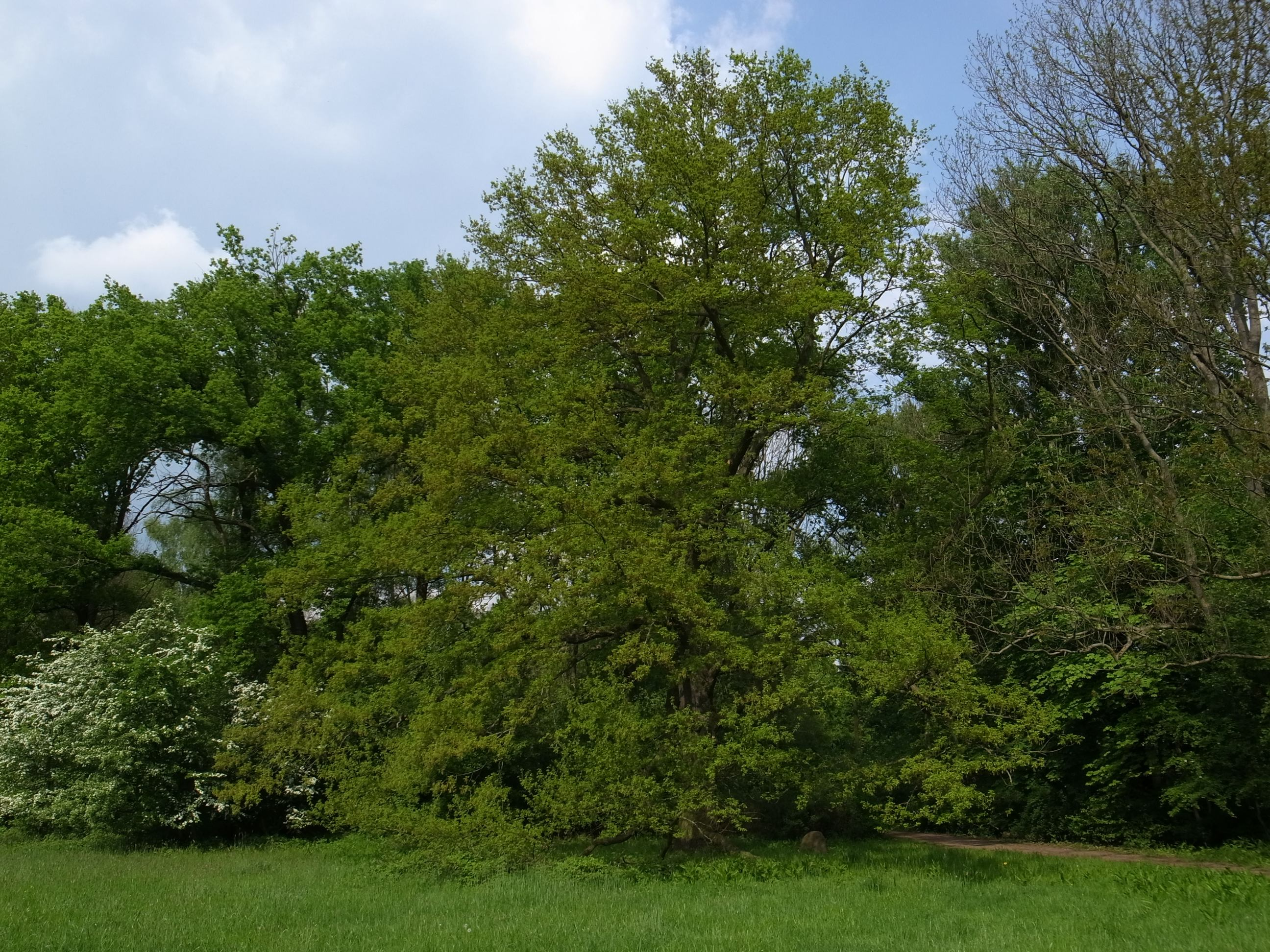 Dessau, Erinnerungseiche mit Gedenkstein im Schillerpark